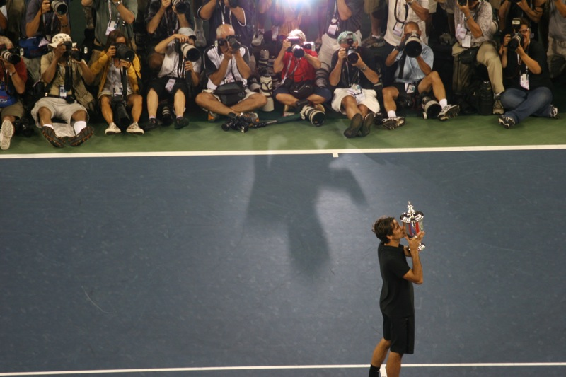 Roger Federer - 2007 US Open Champion